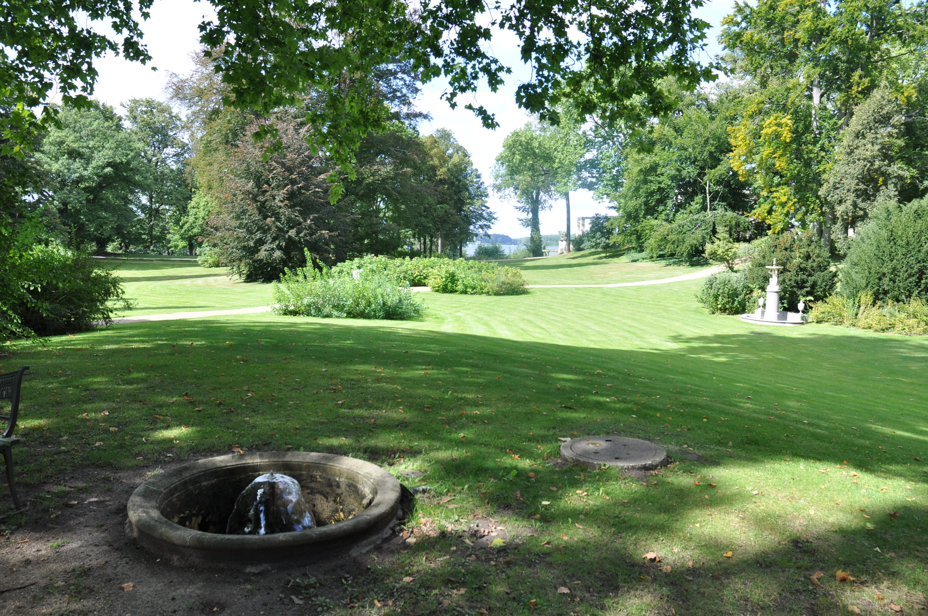 Blick vom Lennéhügel zum Casino in Klein-Glienicke